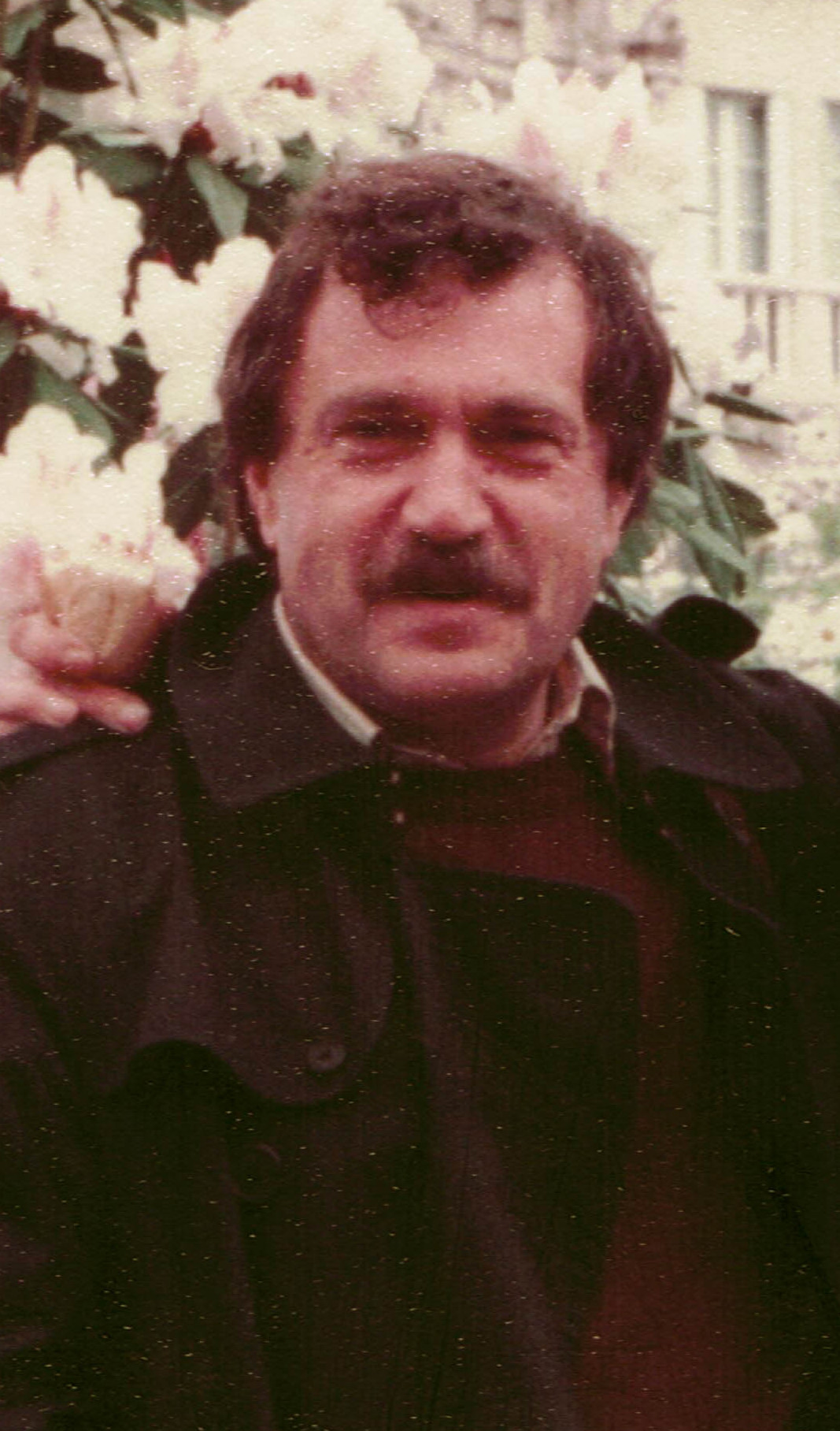 Василий Аксенов и Виктор Некрасов, Орлеан, апрель 1983